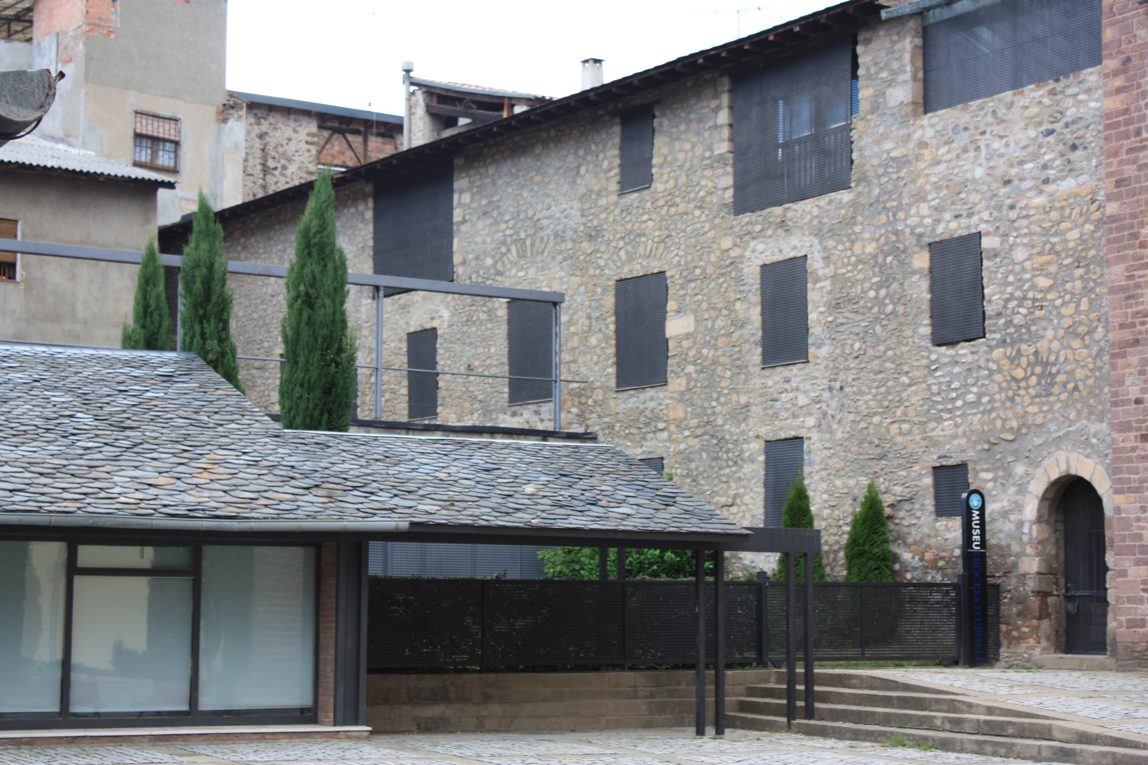 Casa del Deganat, actual Museu d'Urgell del Bisbat a la Seu d'Urgell.